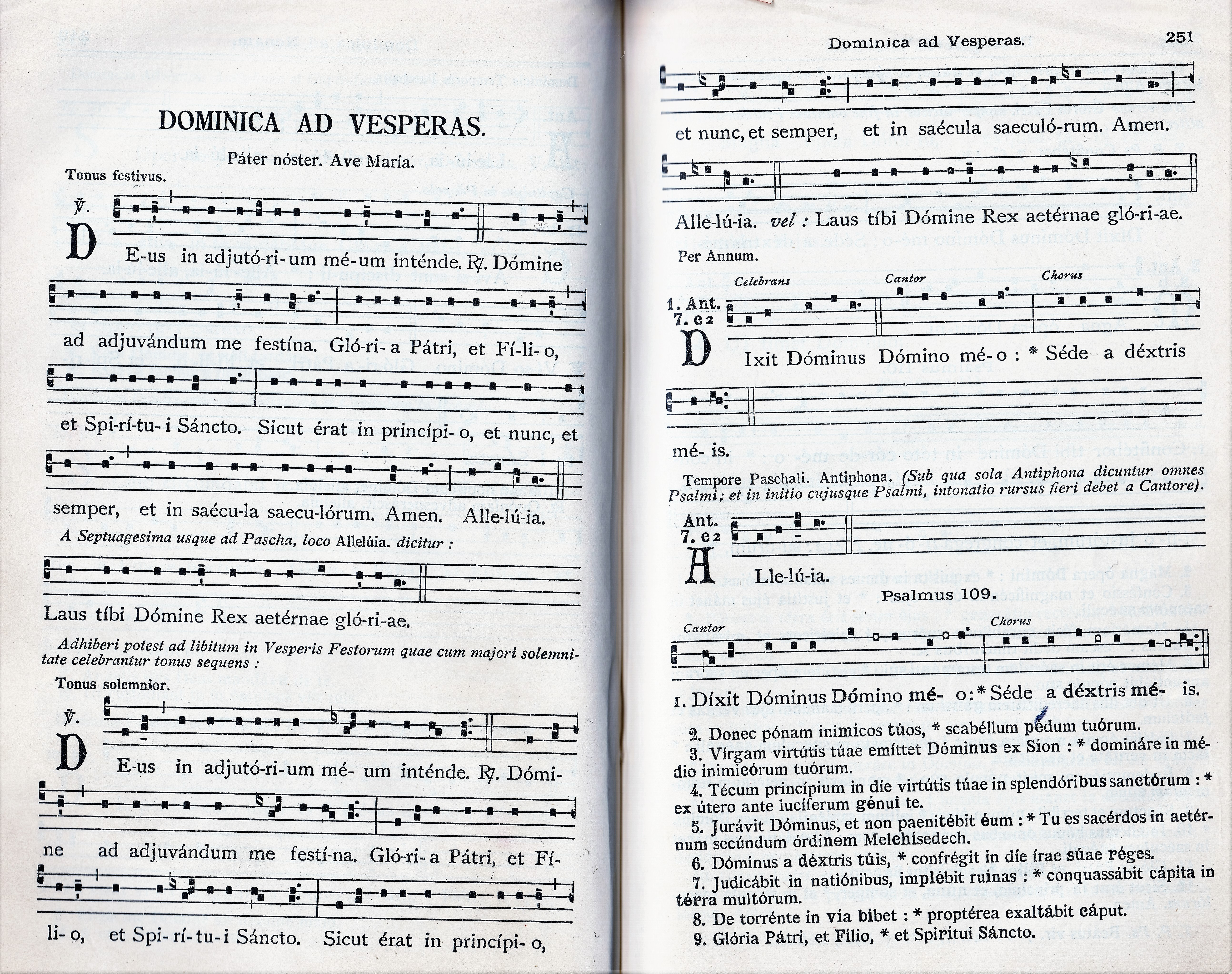 Vesper vom Sonntag - Liber usualis (1954) S. 250f.